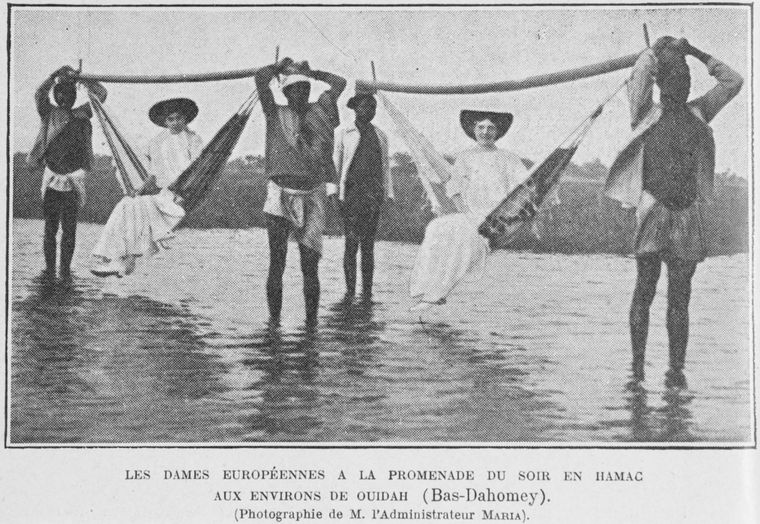 }Les dames européennes a la promenade du soir en hamac aux environs de Ouidah (Bas-Dahomey)} Licensing This work is in the public domain in its country of origin and other countries and areas where the copyright term is the author's life plus 70 years or fewer. You must also include a United States public domain tag to indicate why this work is in the public domain in the United States. Note that a few countries have copyright terms longer than 70 years: Mexico has 100 years, Jamaica has 95 years, Colombia has 80 years, and Guatemala and Samoa have 75 years. This image may not be in the public domain in these countries, which moreover do not implement the rule of the shorter term. Côte d'Ivoire has a general copyright term of 99 years and Honduras has 75 years, but they do implement the rule of the shorter term. Copyright may extend on works created by French who died for France in World War II (more information), Russians who served in the Eastern Front of World War II (known as the Great Patriotic War in Russia) and posthumously rehabilitated victims of Soviet repressions (more information). This file has been identified as being free of known restrictions under copyright law, including all related and neighboring rights.